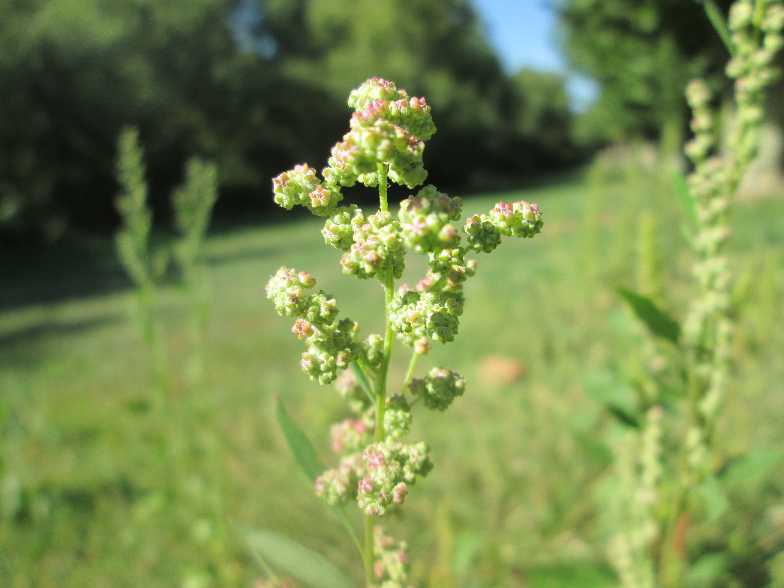 Weißer Gänsefuß (Chenopodium album) in Saarbrücken